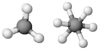 Conformazioni eclissata e sfalsata della molecola dell'etano